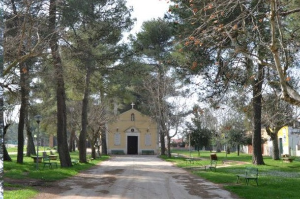 Strada principale e chiesetta di Mellitto, frazione di Grumo Appula